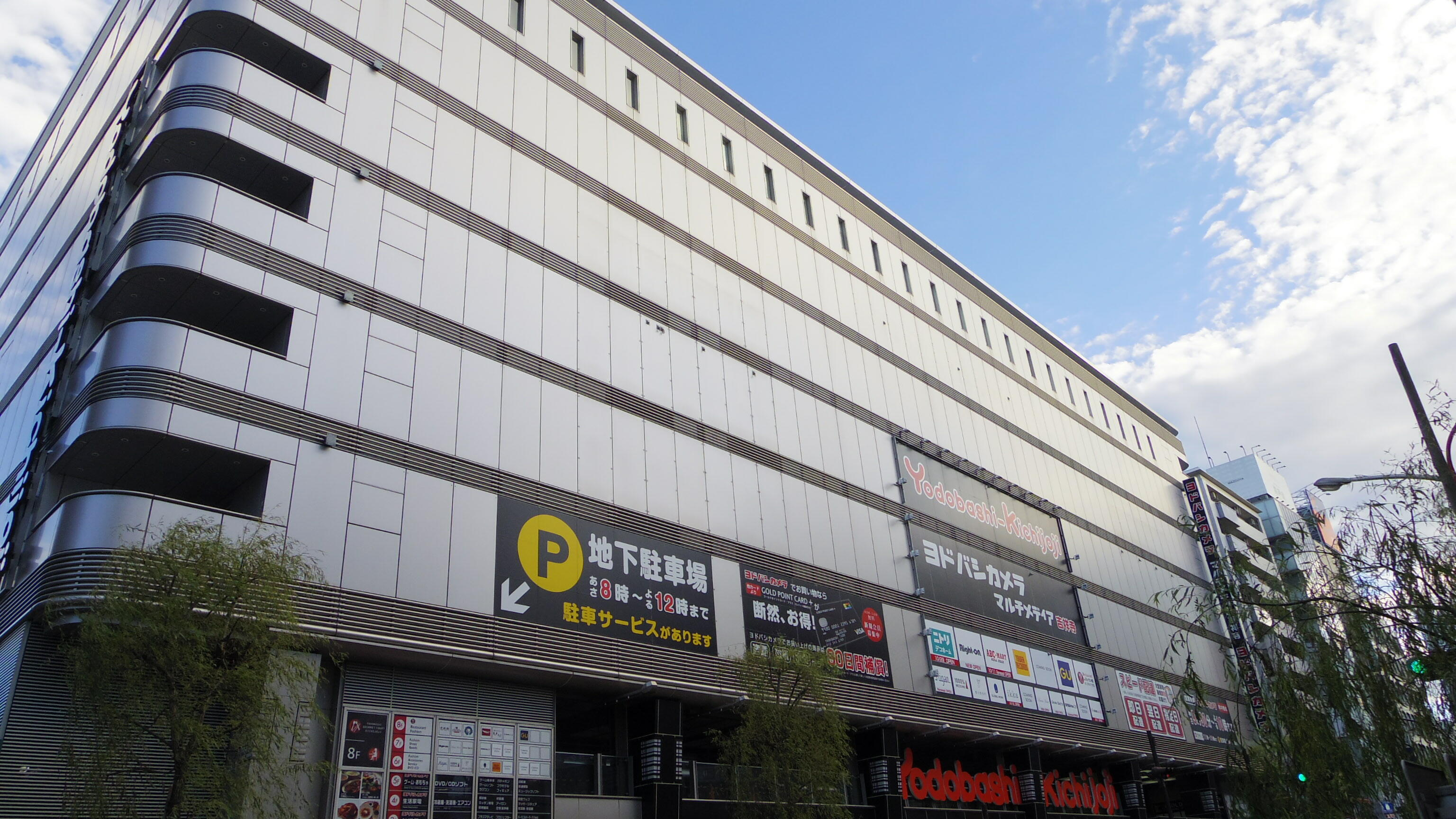 ヨドバシカメラマルチメディア吉祥寺（東京都武蔵野市）。2014年10月撮影（外装が一部変更）